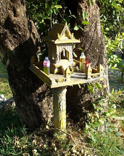 Kambodscha/Cambodia, Sihanoukville, Geisterhaus/spirit house